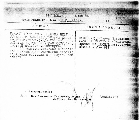 Типовая "выписка из протокола" Тройки НКВД. В период Большого Террора 1937-1938 гг. такие листочки подшивались в личные дела осужденных вместо судебных приговоров. Этому осужденному кроме посещения собраний к-р (контрреволюционной) группы "сектантов" никаких других обвинений не предъявлялось